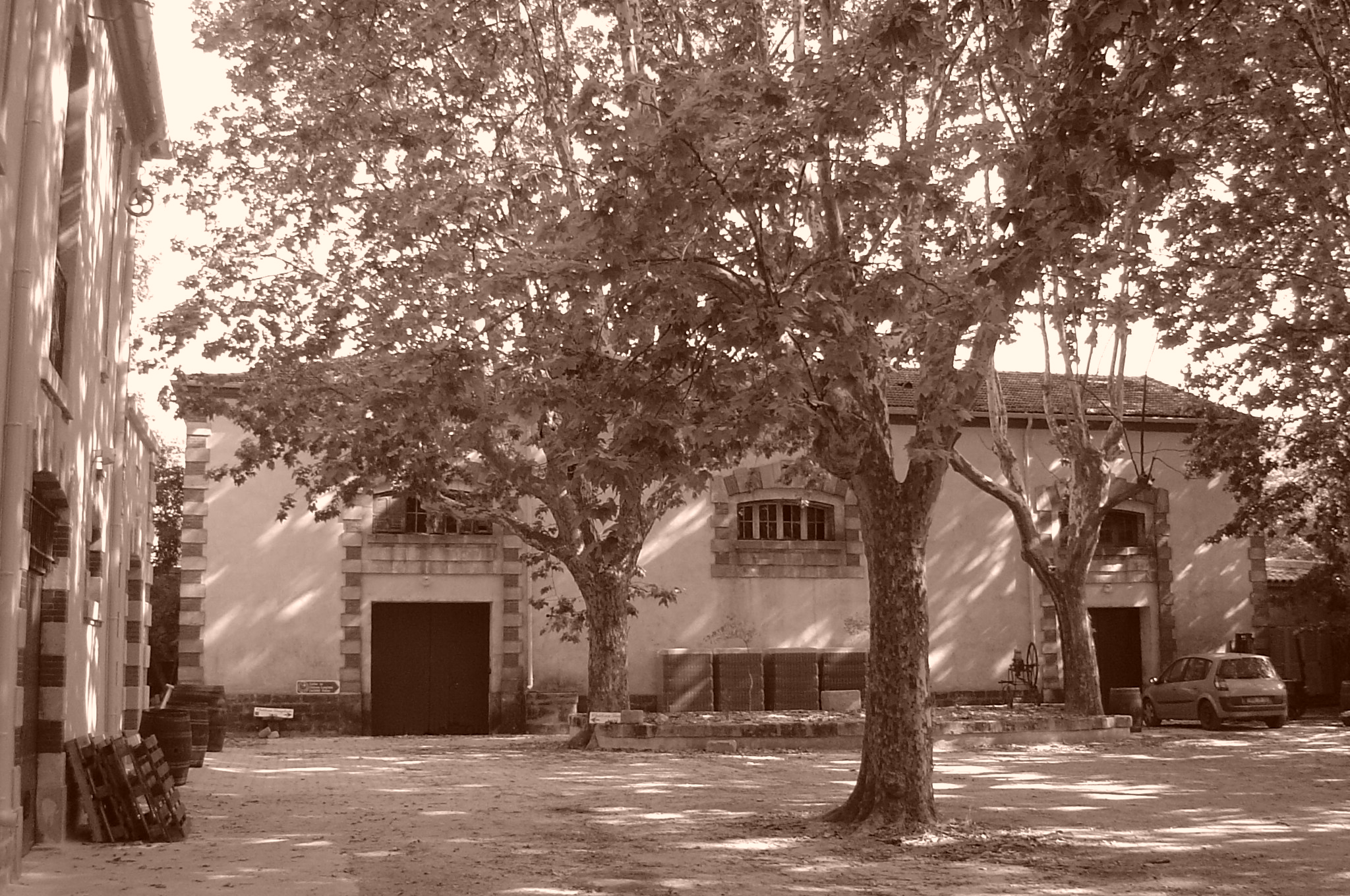 Cave du Château Langlade (bâtiment principal) - Gard, France.